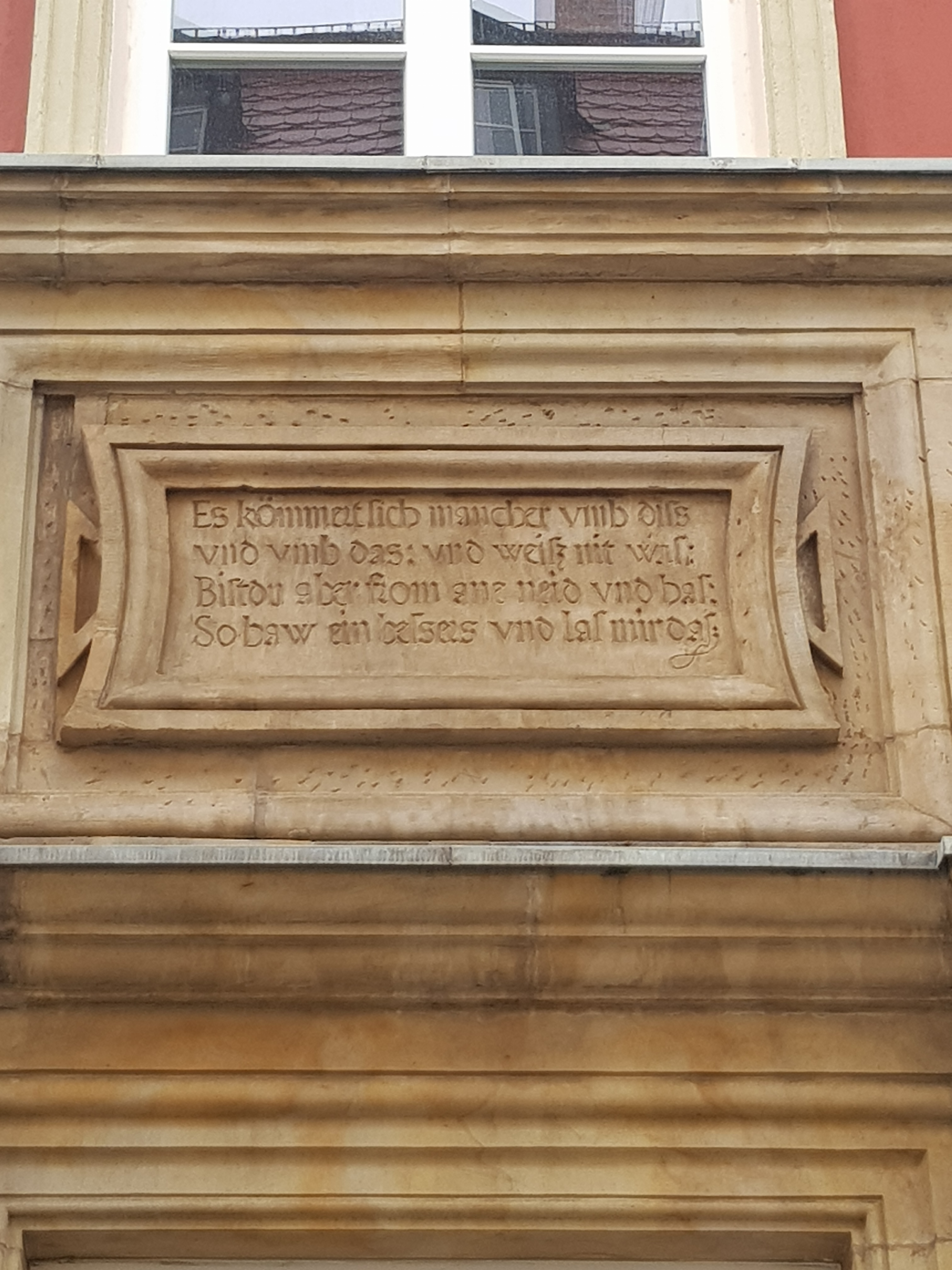 Pałac Schlegenbergów we Wrocławiu, detal